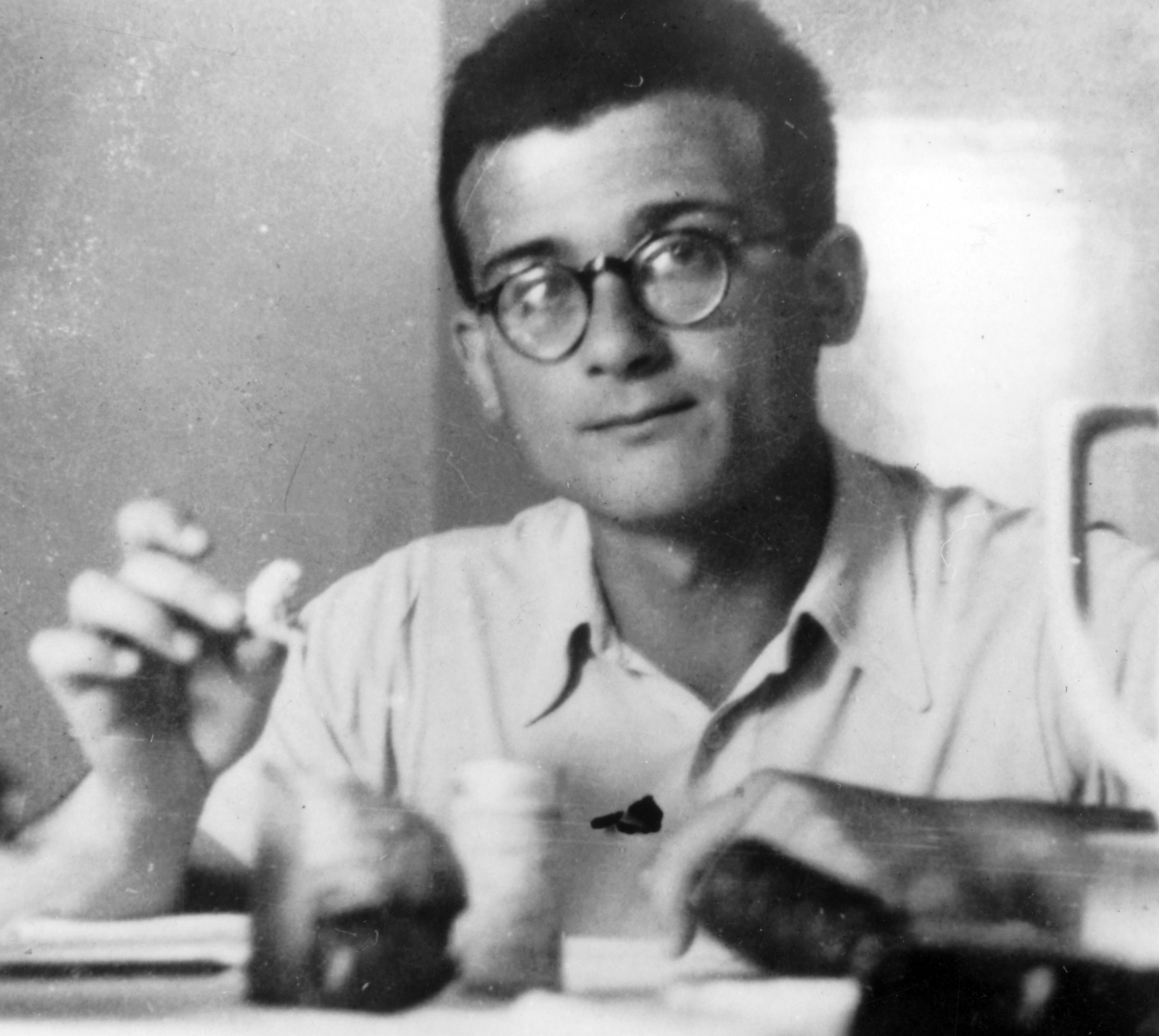 Ságvári Endre. Location: Hungary Tags: portrait, communism Title: Ságvári Endre.